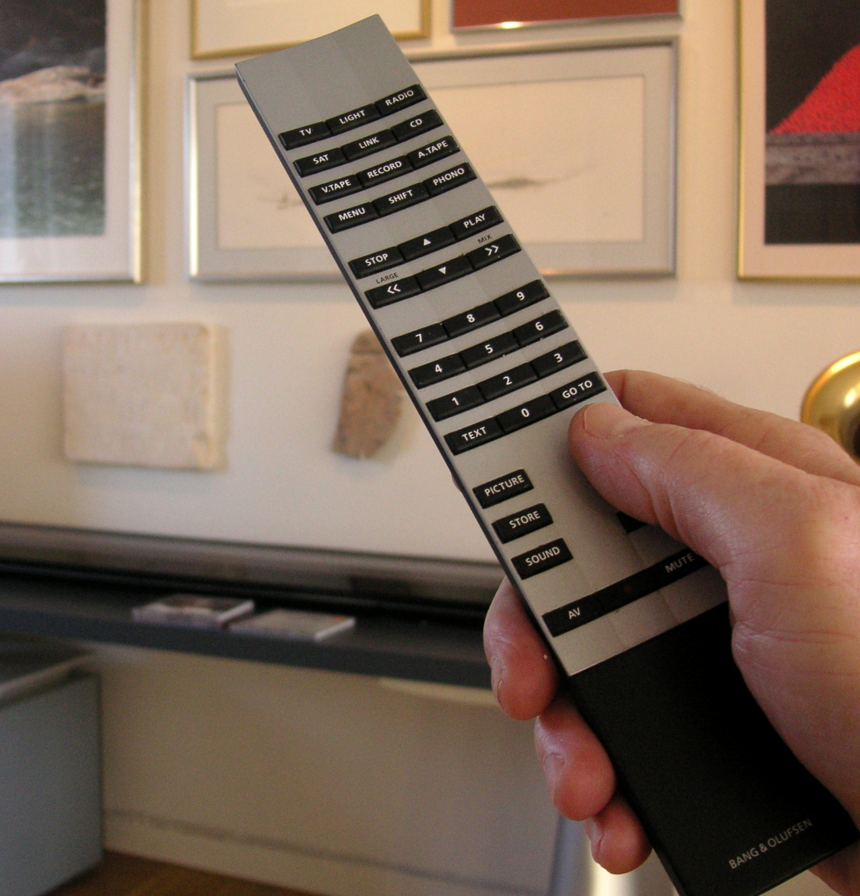 Fjärrkontroll Beolink 1000